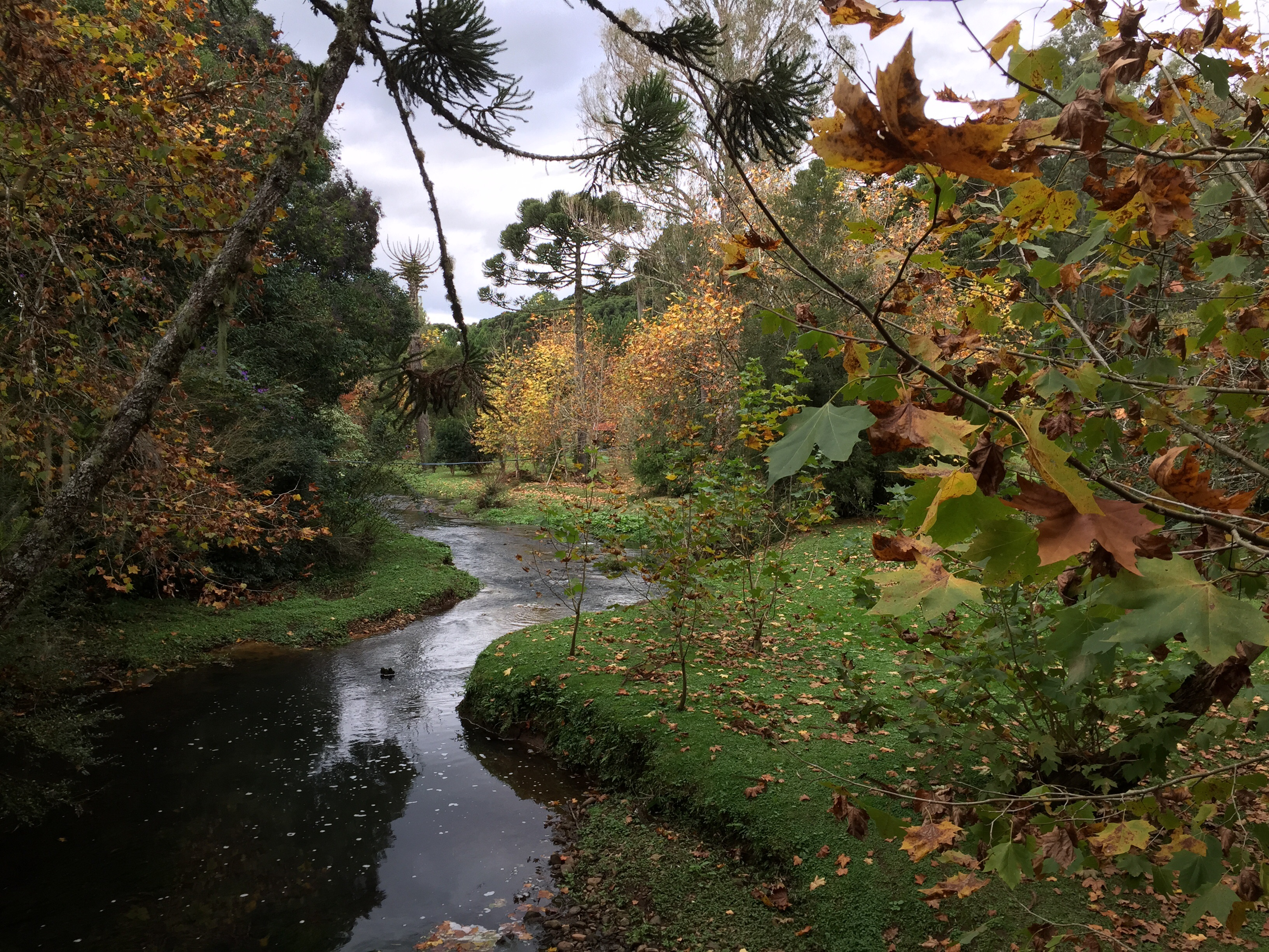 Castelinho do Caracol, Canela RS